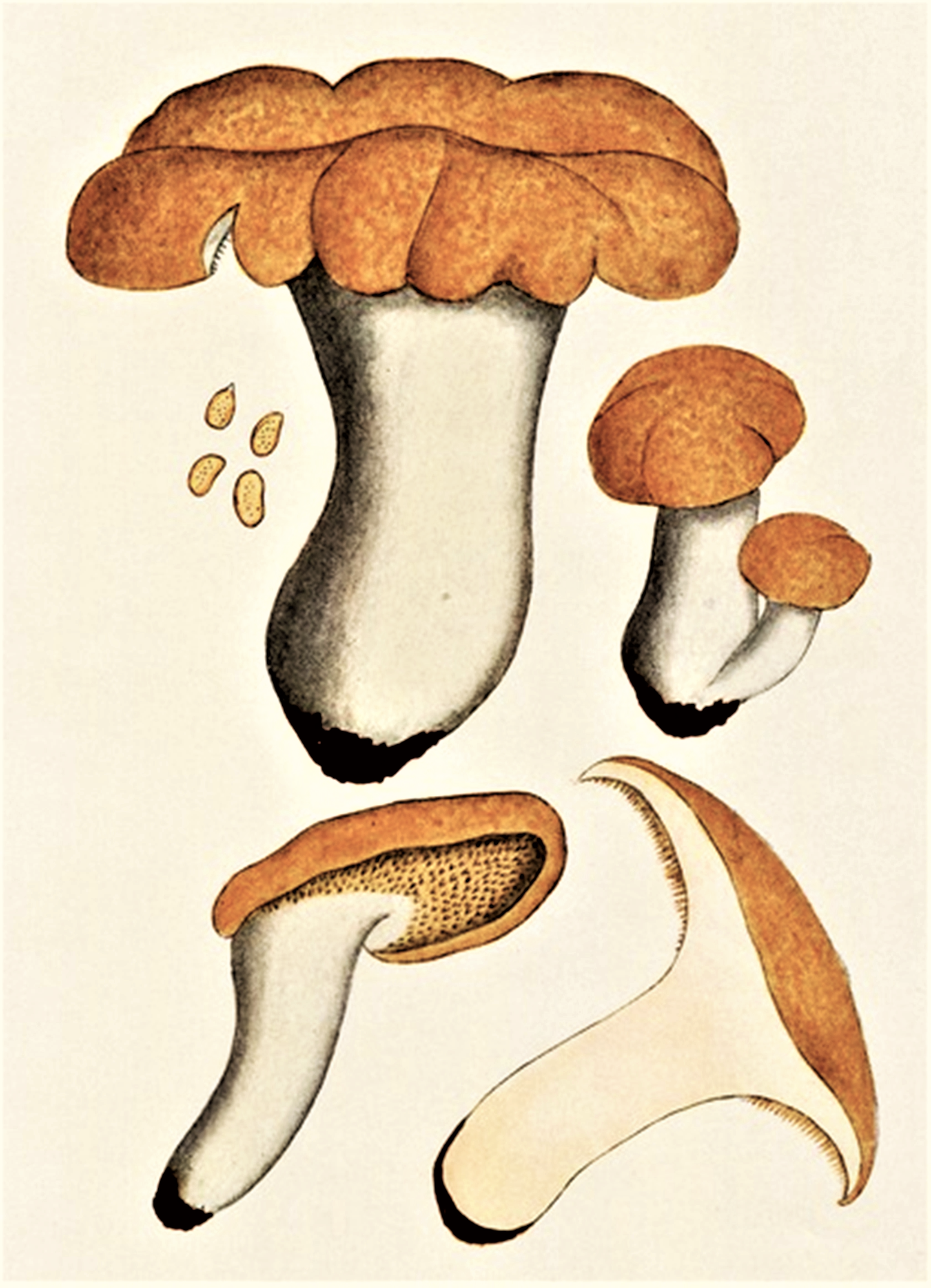 Giacomo Bresadola: Hydnum repandum Pers. (1799) [1800]